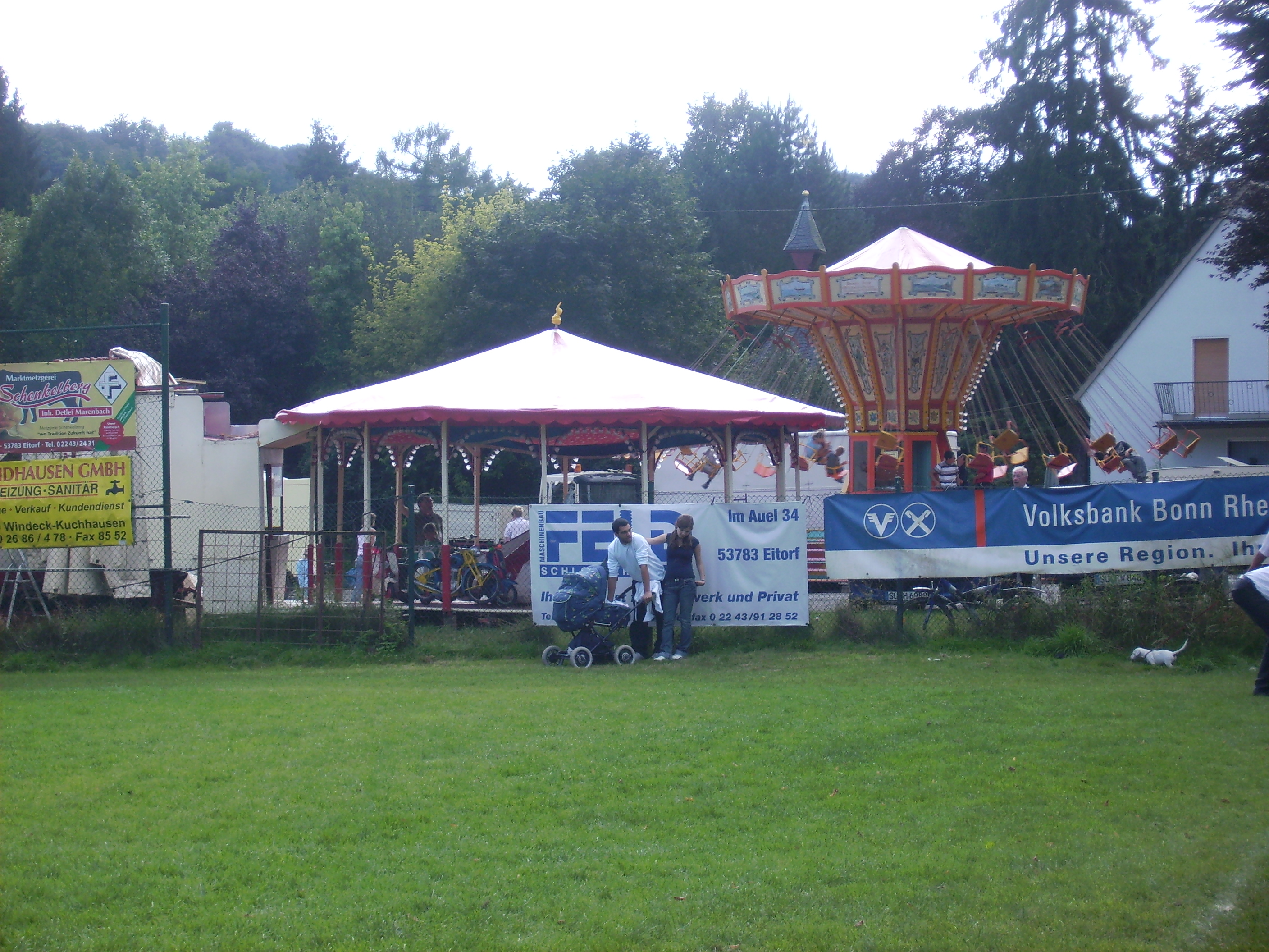 Karussels der kleinen Herchener Dorfkirmes